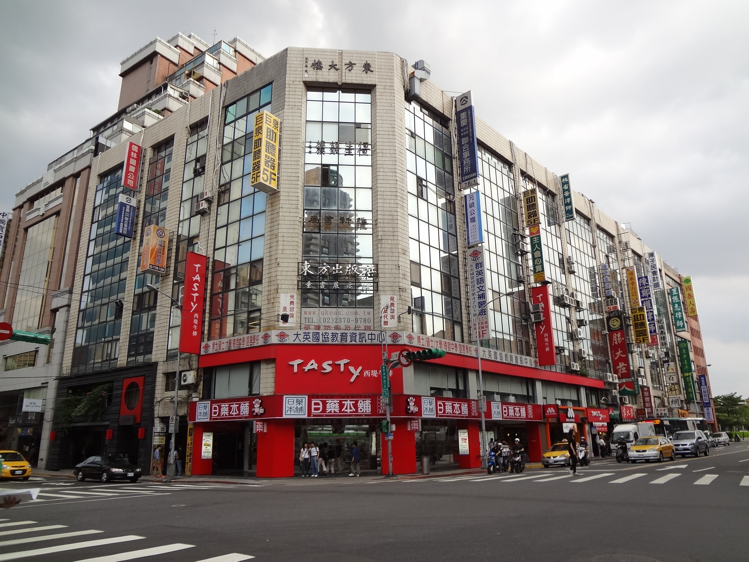 東方大樓，位於臺北市中正區重慶南路一段，4樓曾是台灣東方出版社總部。